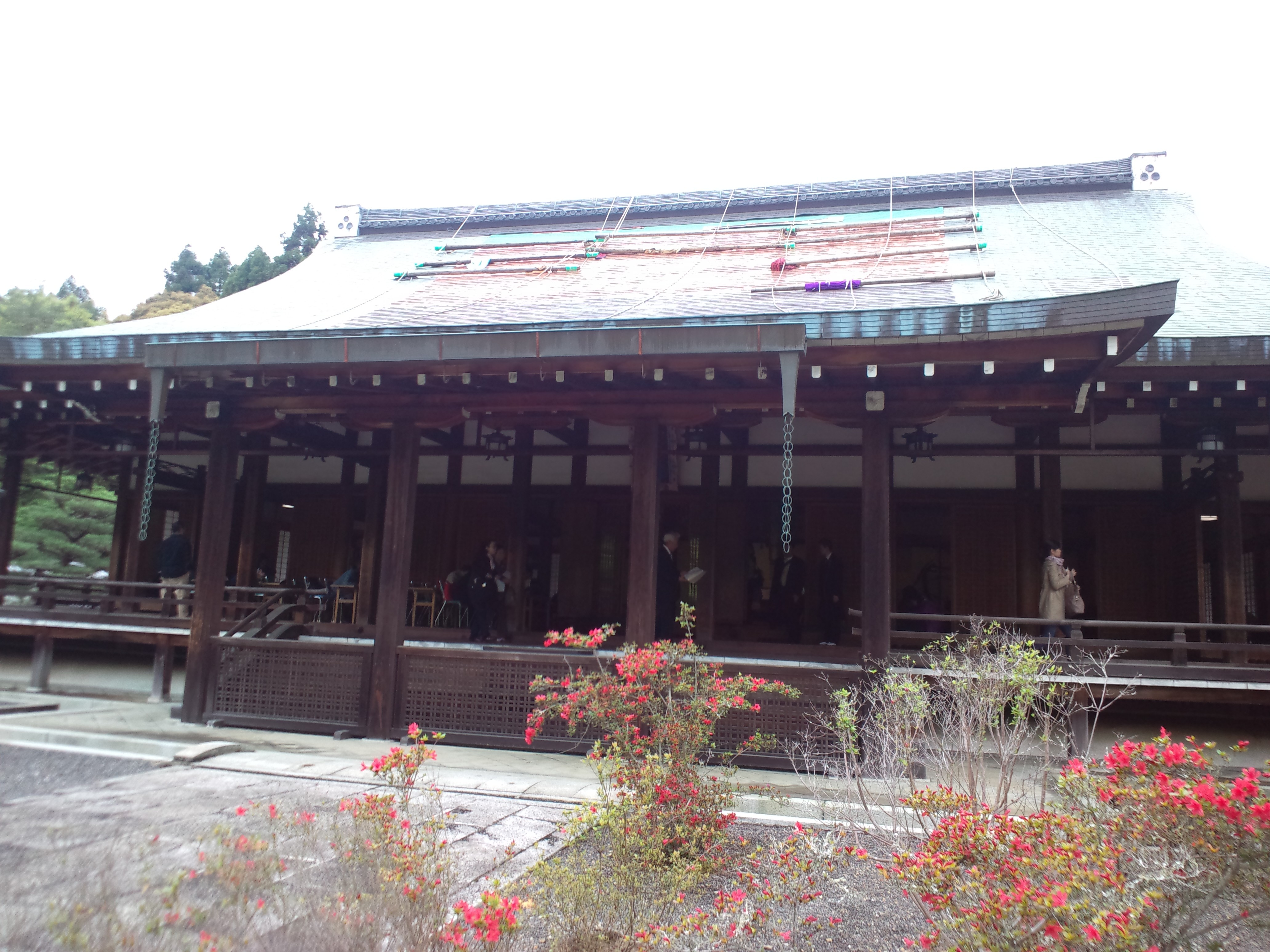 西芳寺 本堂（西来堂）